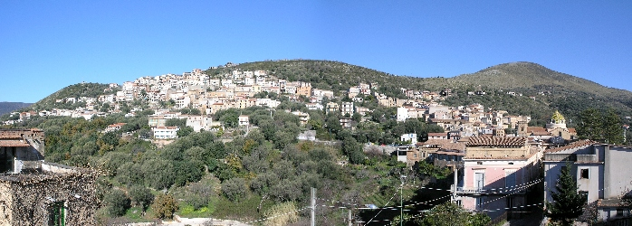 Panorama di Lentiscosa (SA)